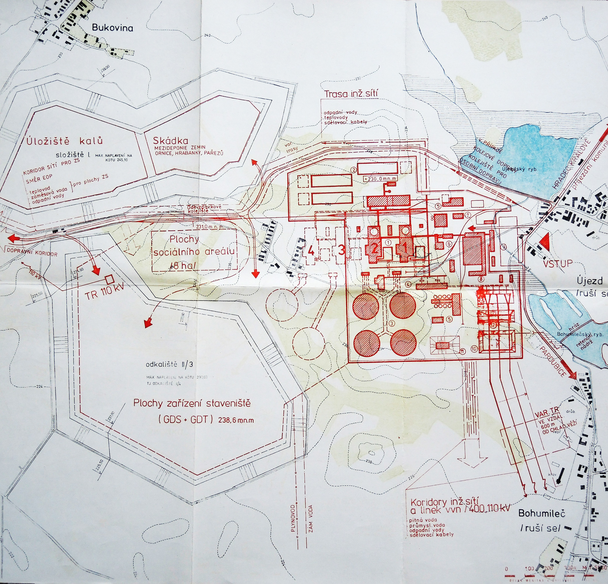 Katastrální plány JE Tetov.